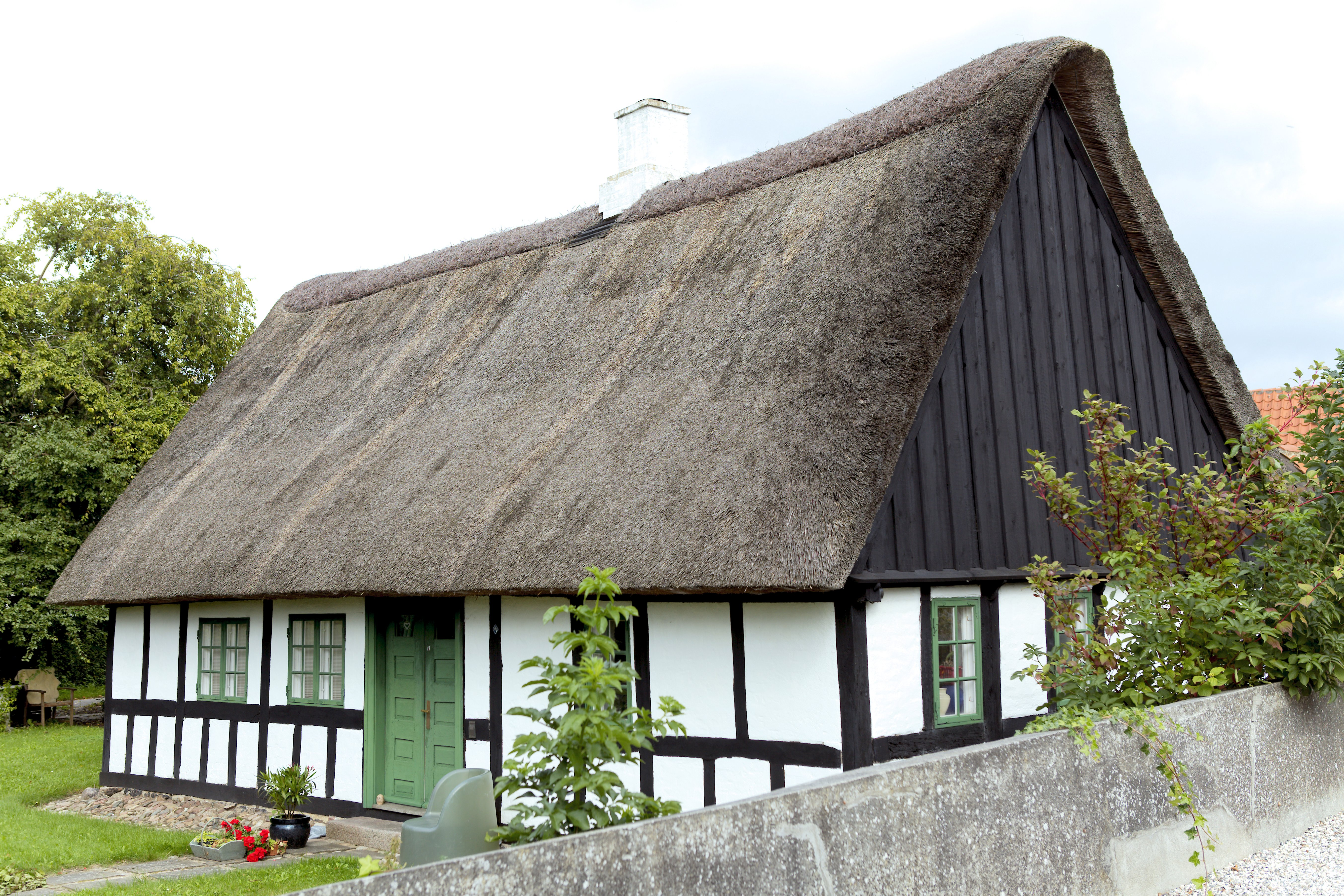 Thoralds Hus set fra Tilst kirkegård